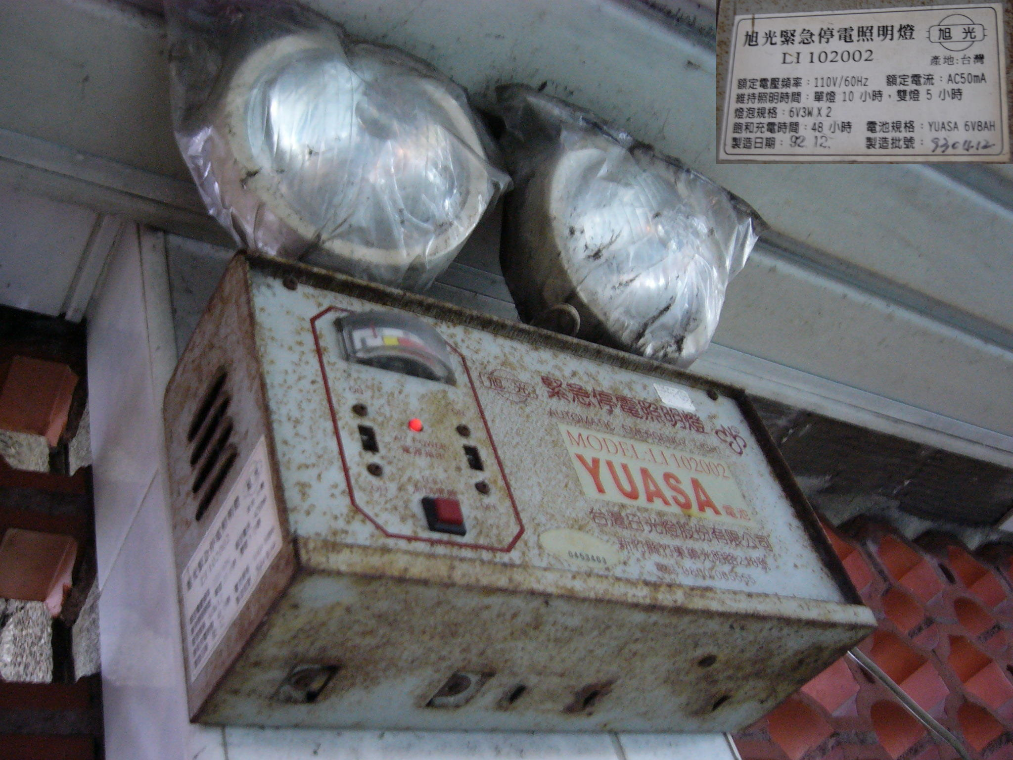 中文（台灣）: 台灣日光燈於2003年12月製造的旭光緊急停電照明燈LI102002。